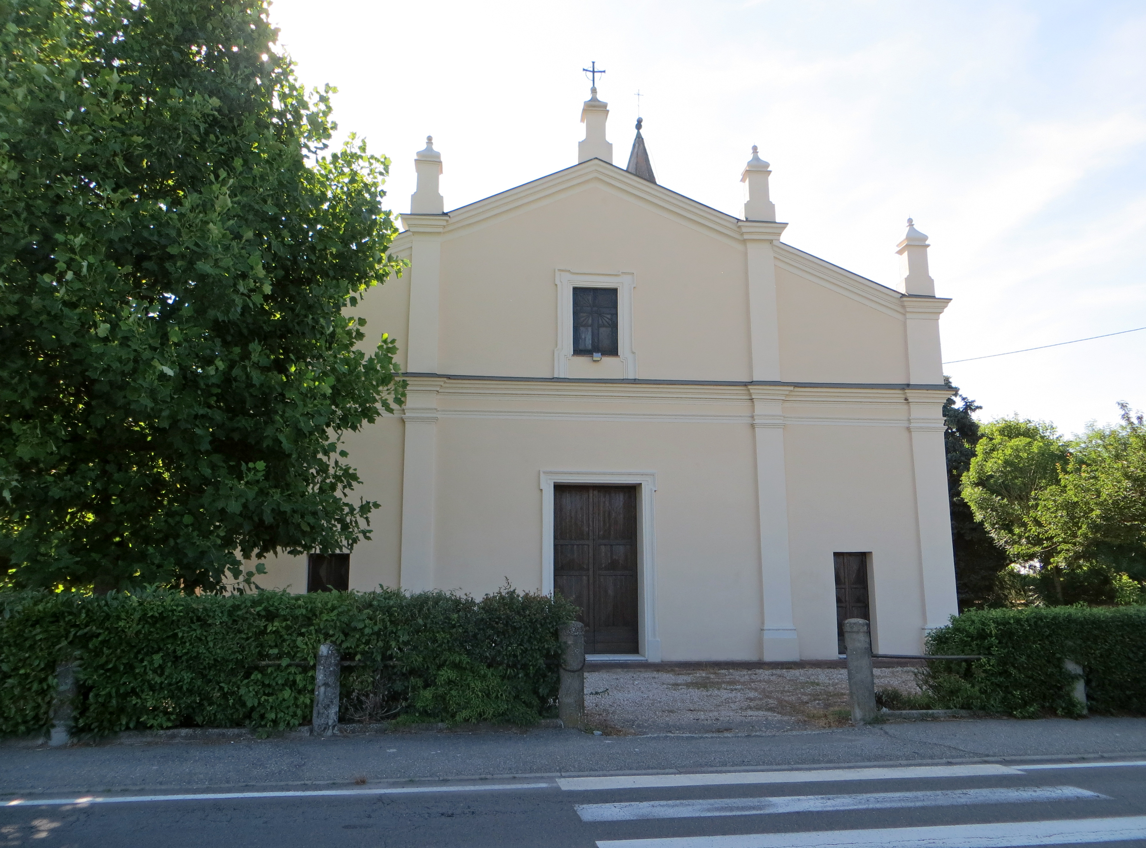 Chiesa dei Santi Quirico e Giulitta (San Quirico, Sissa Trecasali) - facciata